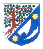 Znak obce Mokré